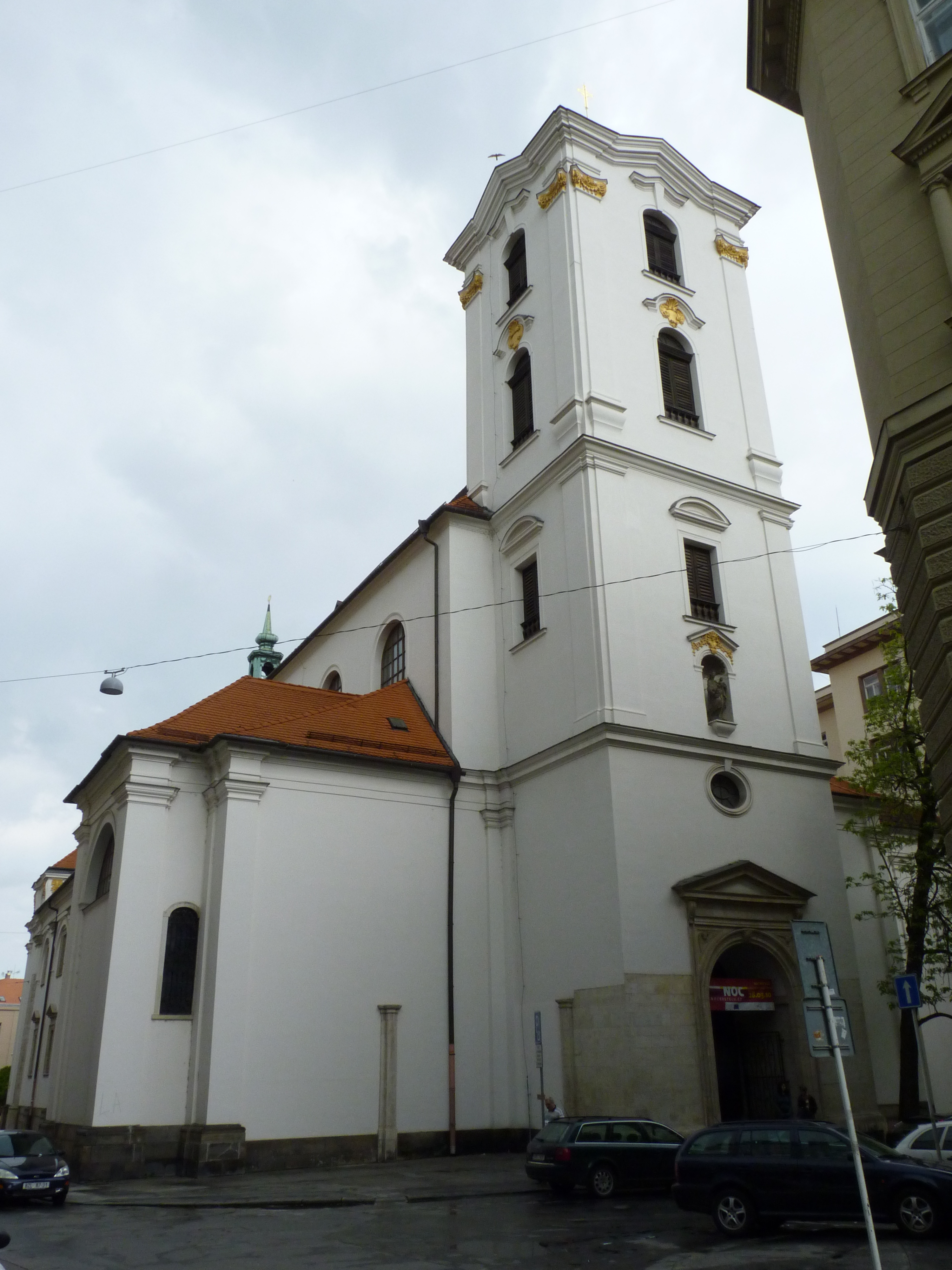 Kostel Nanebevzetí Panny Marie v Brně, Brno